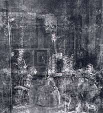 Radiografía lenzo As Meninas